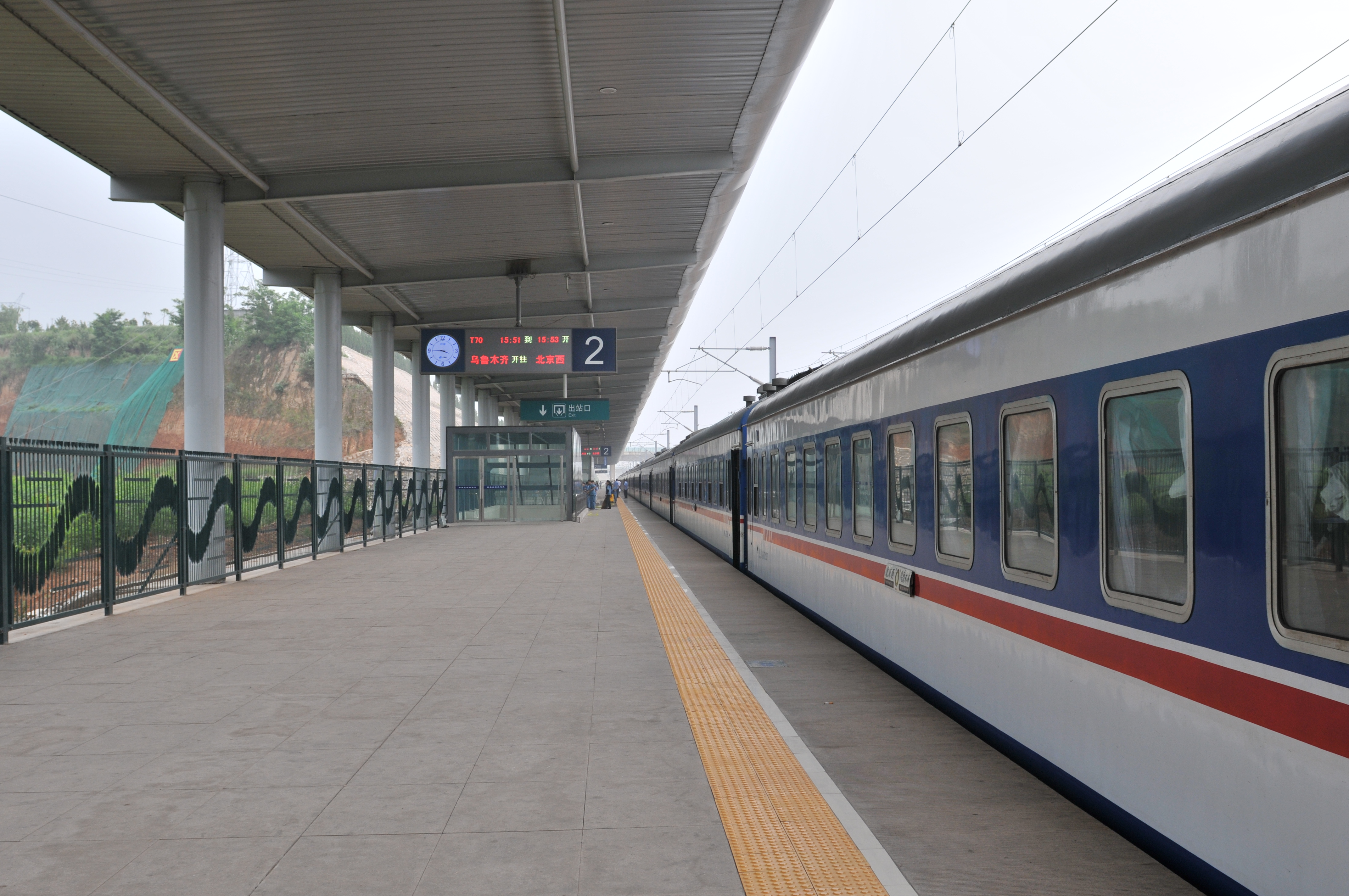 中国山西省阳泉市盂县 China Shanxi Yangquan Yu County China Xinjiang Urumqi Welcome you to tour the, Китай Синьцзяна Урумчи приветствовать Вас на экскурсию, الصين ترحب زيارتك لاورومتشى فى شينجيانغ, 中国新疆のウルムチへの訪問を歓迎する, 中国新疆乌鲁木齐欢迎您来观光旅游